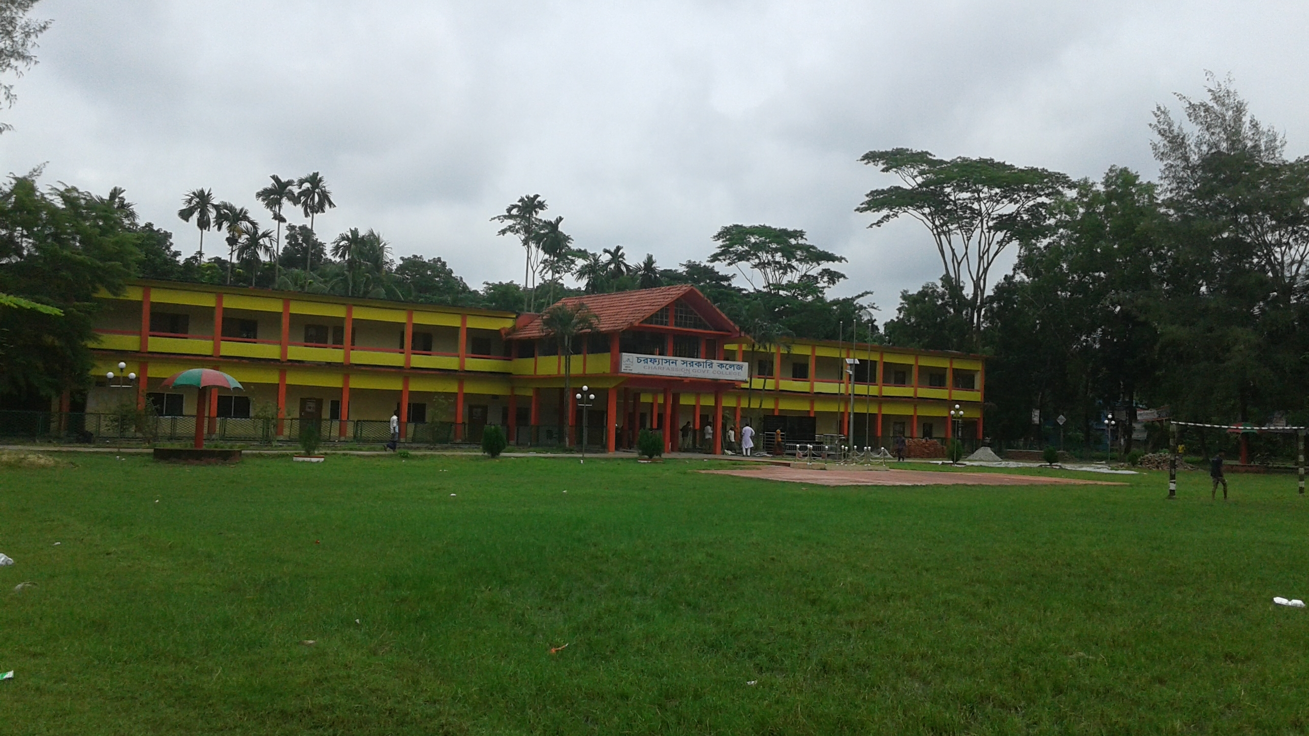 চরফ্যাসন সরকারি কলেজ।প্রশাসনিক ভবন।